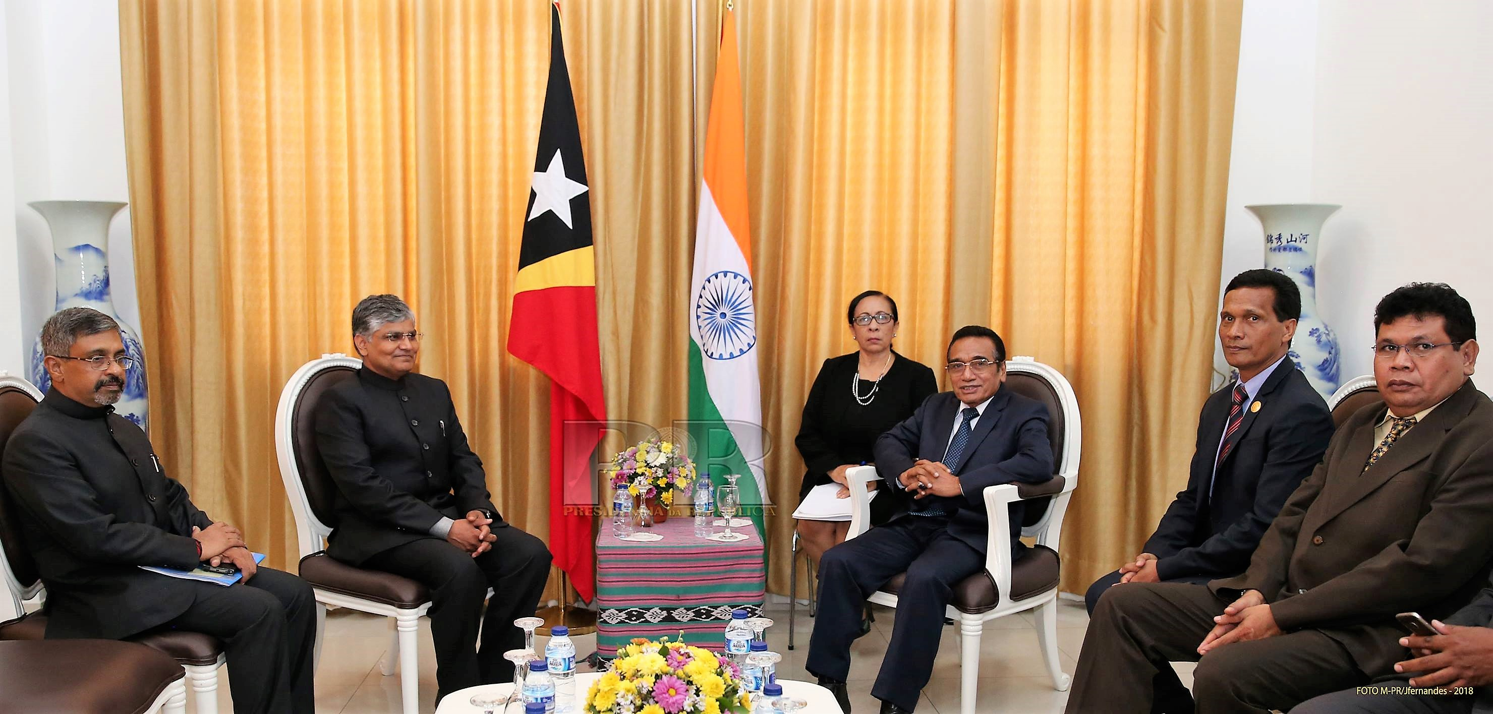 Indiens Botschafter Pradeep Kumar Rawat und Osttimors Präsident Francisco Guterres